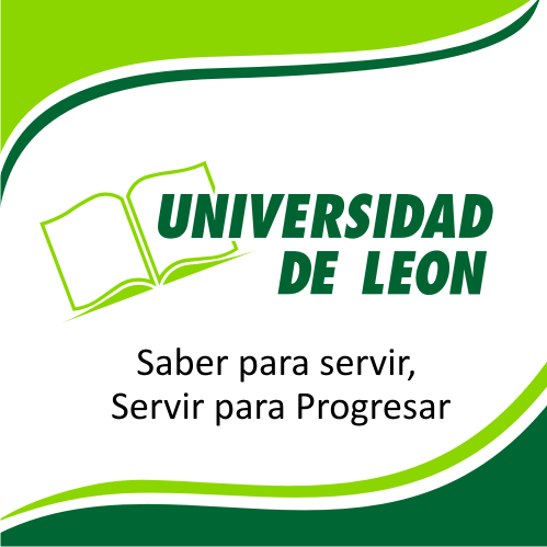 Imágen de perfil en redes sociales de la Universidad de León